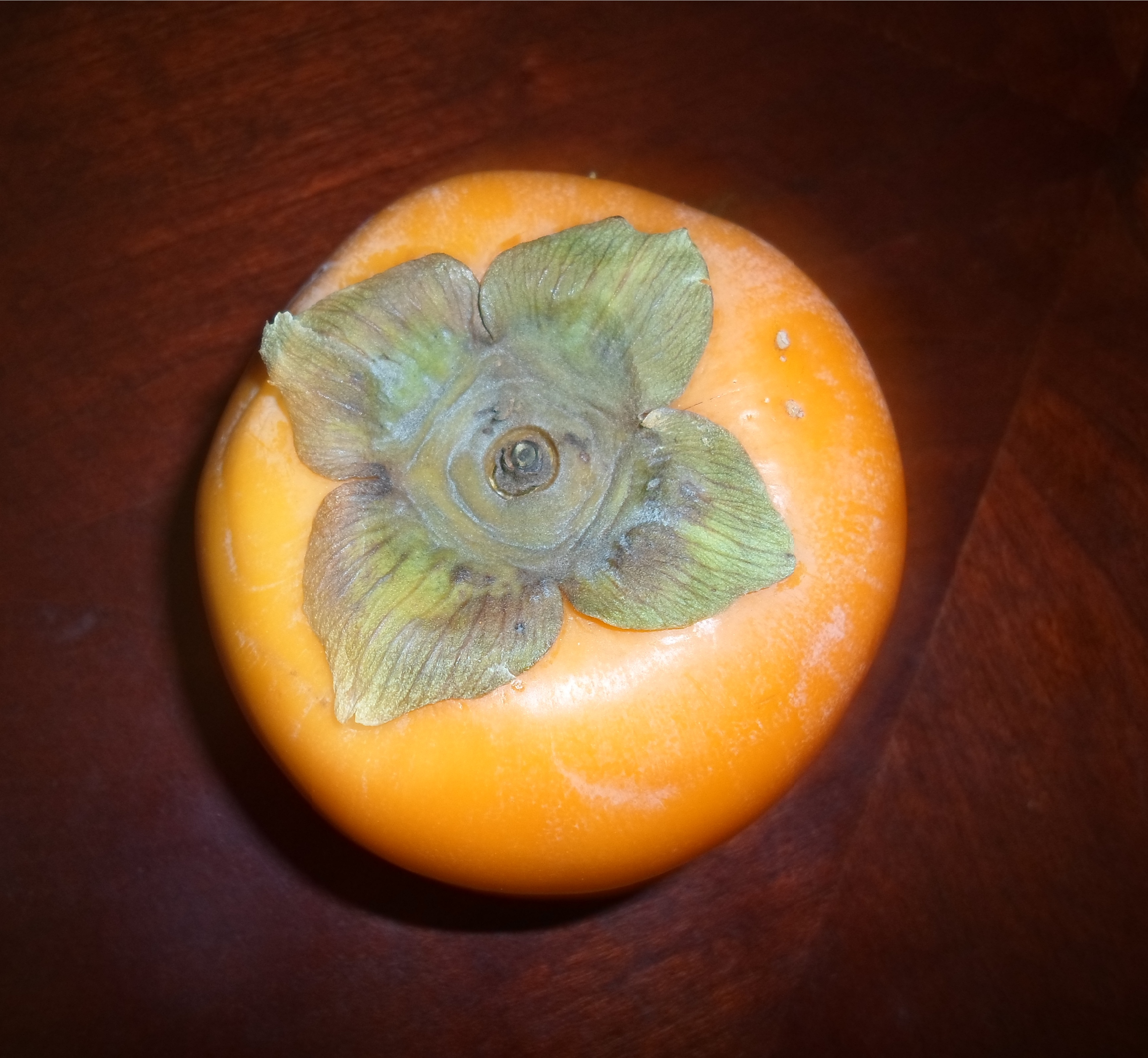 Kaki (persimmon) fruit